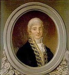 Antonio Ranz Romnillos (1759-1830) político ilustrado partícipe en la reforma provincial de 1812.